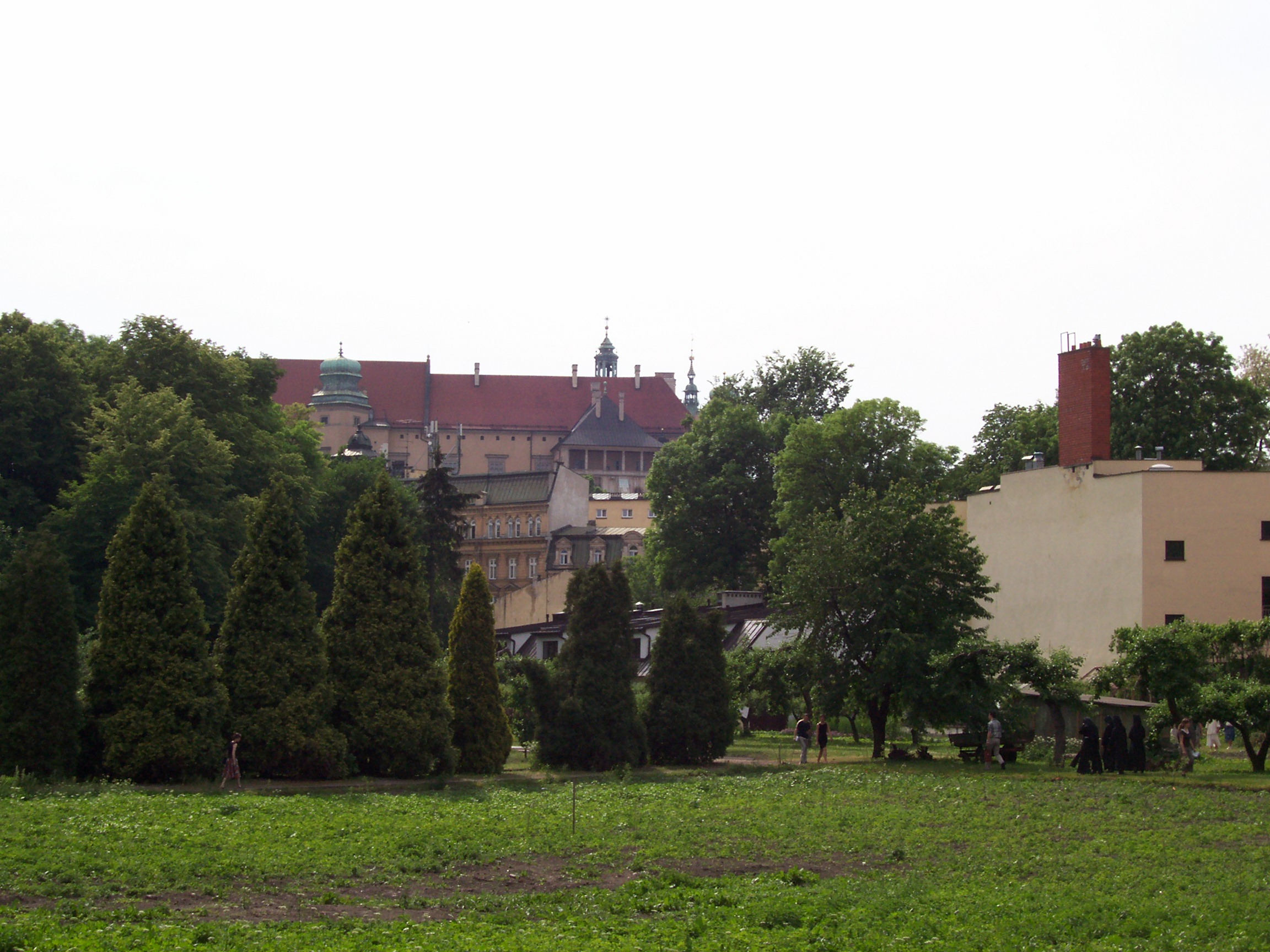 Małopolska. Kraków Stradom 4-6. Kościół Nawrócenia św. Pawła. Ogród.